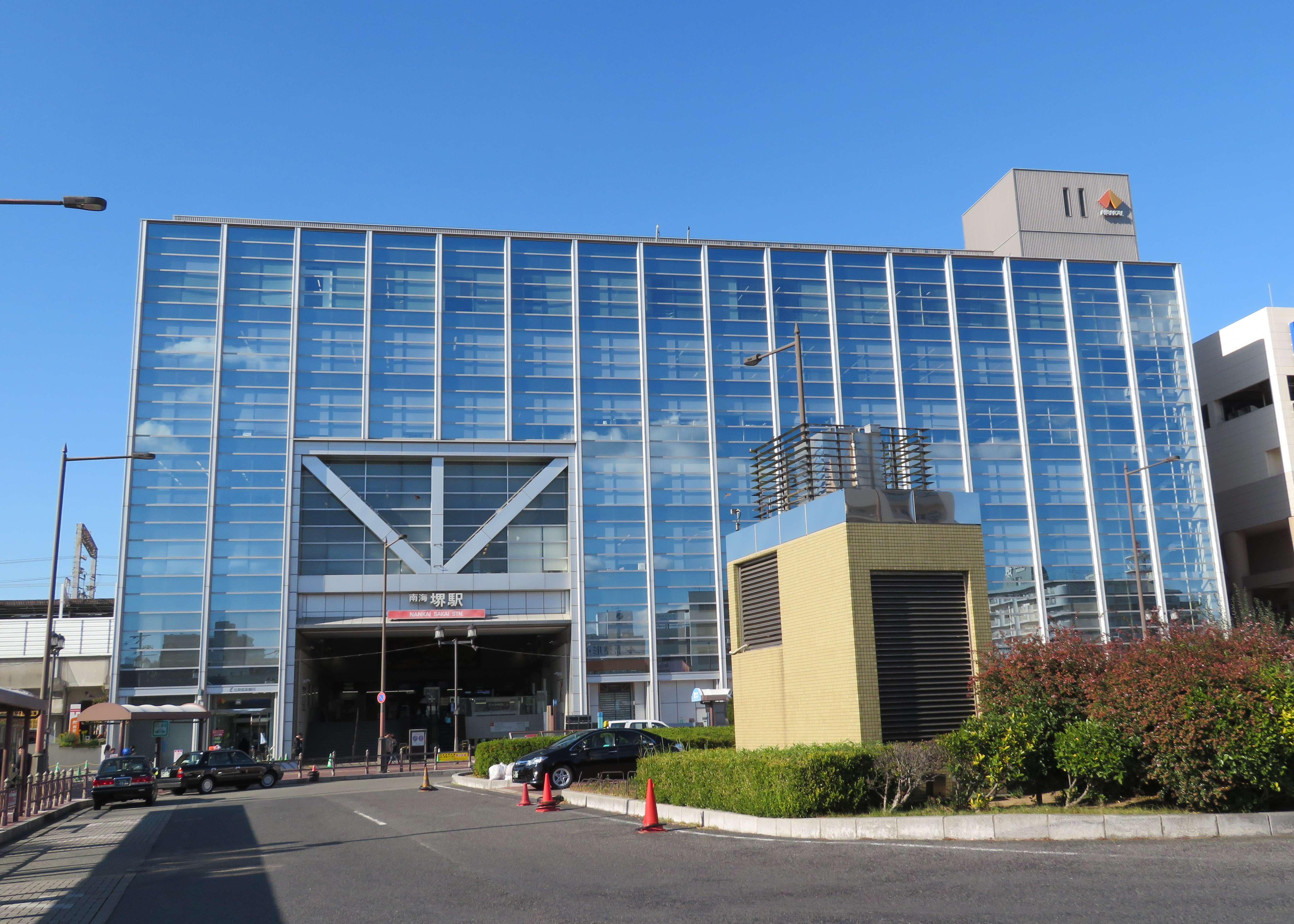 南海電鉄堺駅